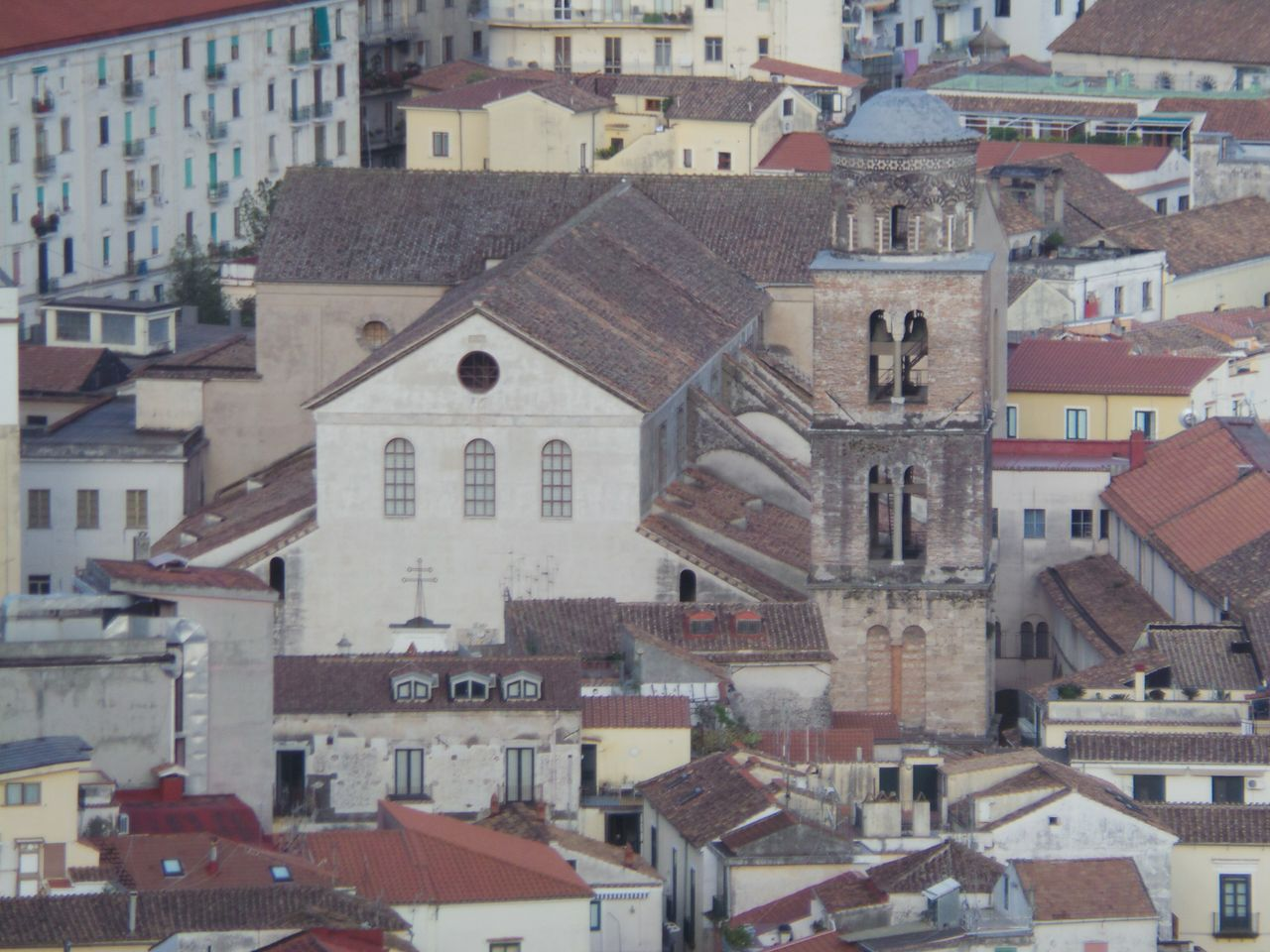 Il Rione Duomo di Salerno